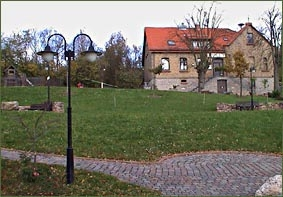 Eckenrother Dorfplatz vor der "Alten Schule" und dem heutigen Gasthaus "Zur Linde"